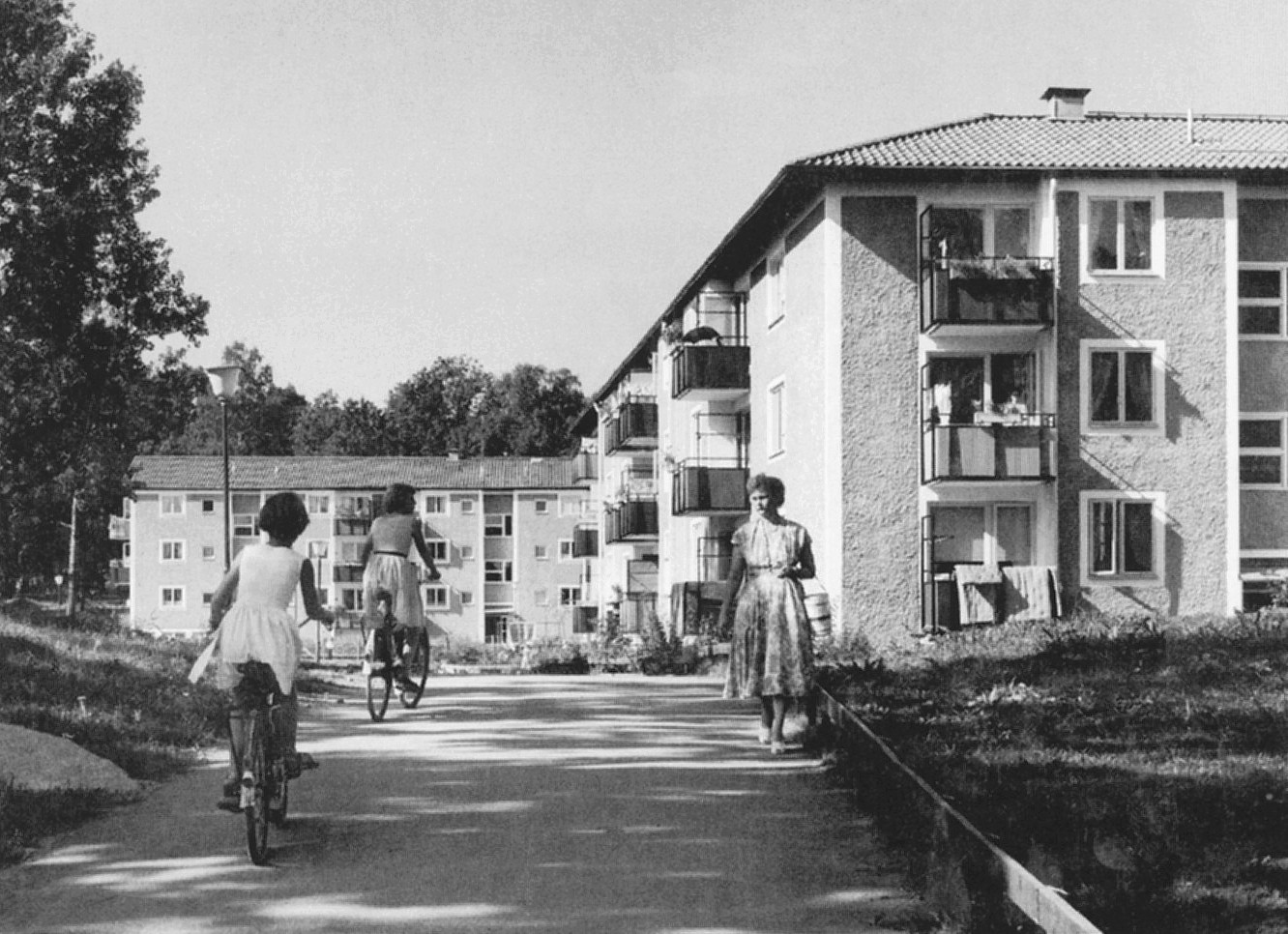 Bostadsområdet "Baronbackarna" i Örebro